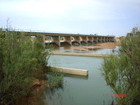 A l’entrée de la plaine d’Abadla se trouve un deuxième barrage, appelé barrage de reprise, plus petit que celui de djorf torba,a été achevé en 1974.